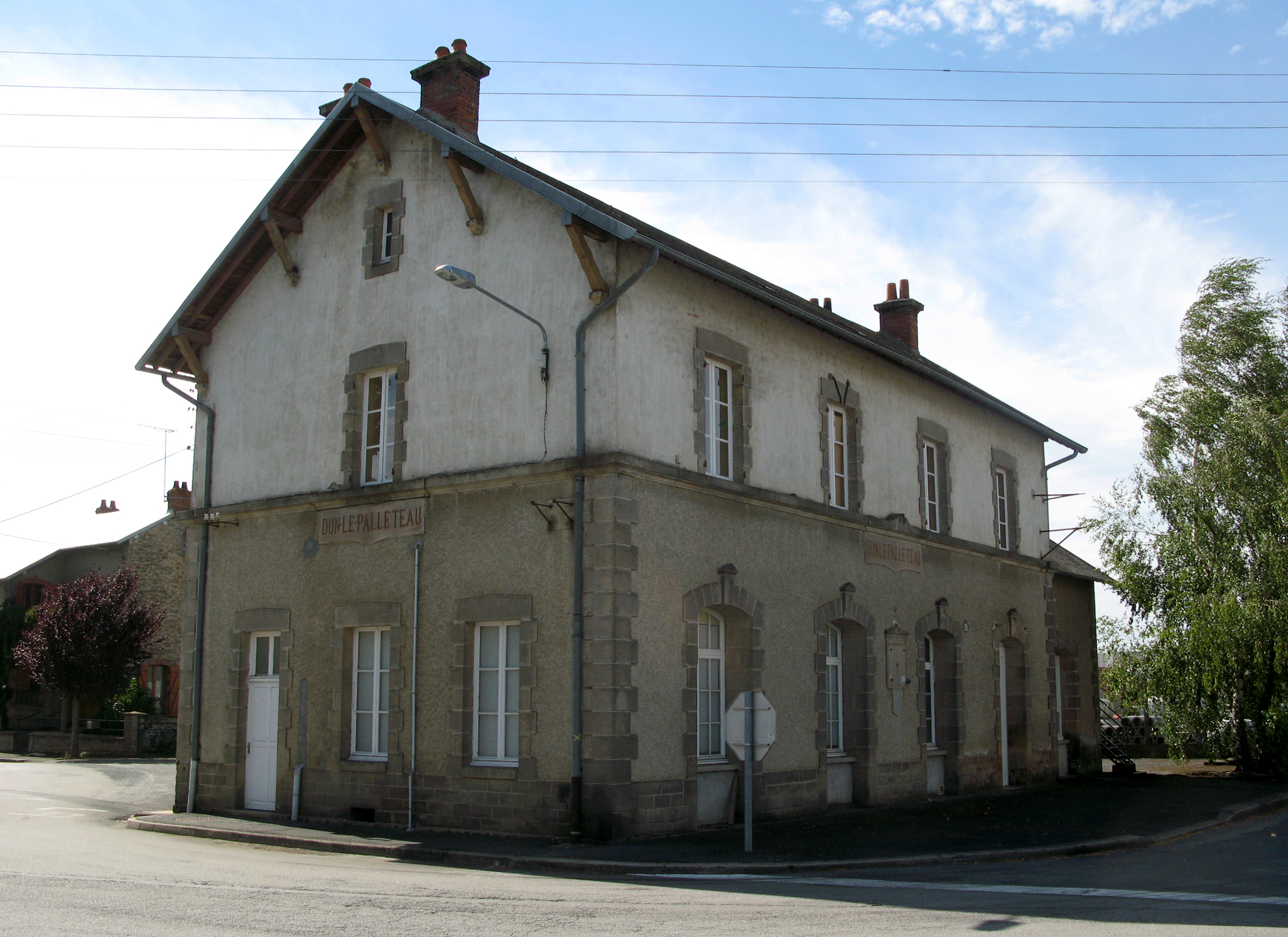 Dun-le-Palestel (Creuse, France) - L'ancienne gare, dont les murs portent encore l'ancien nom de la commune : "Dun-le-Palleteau". . .